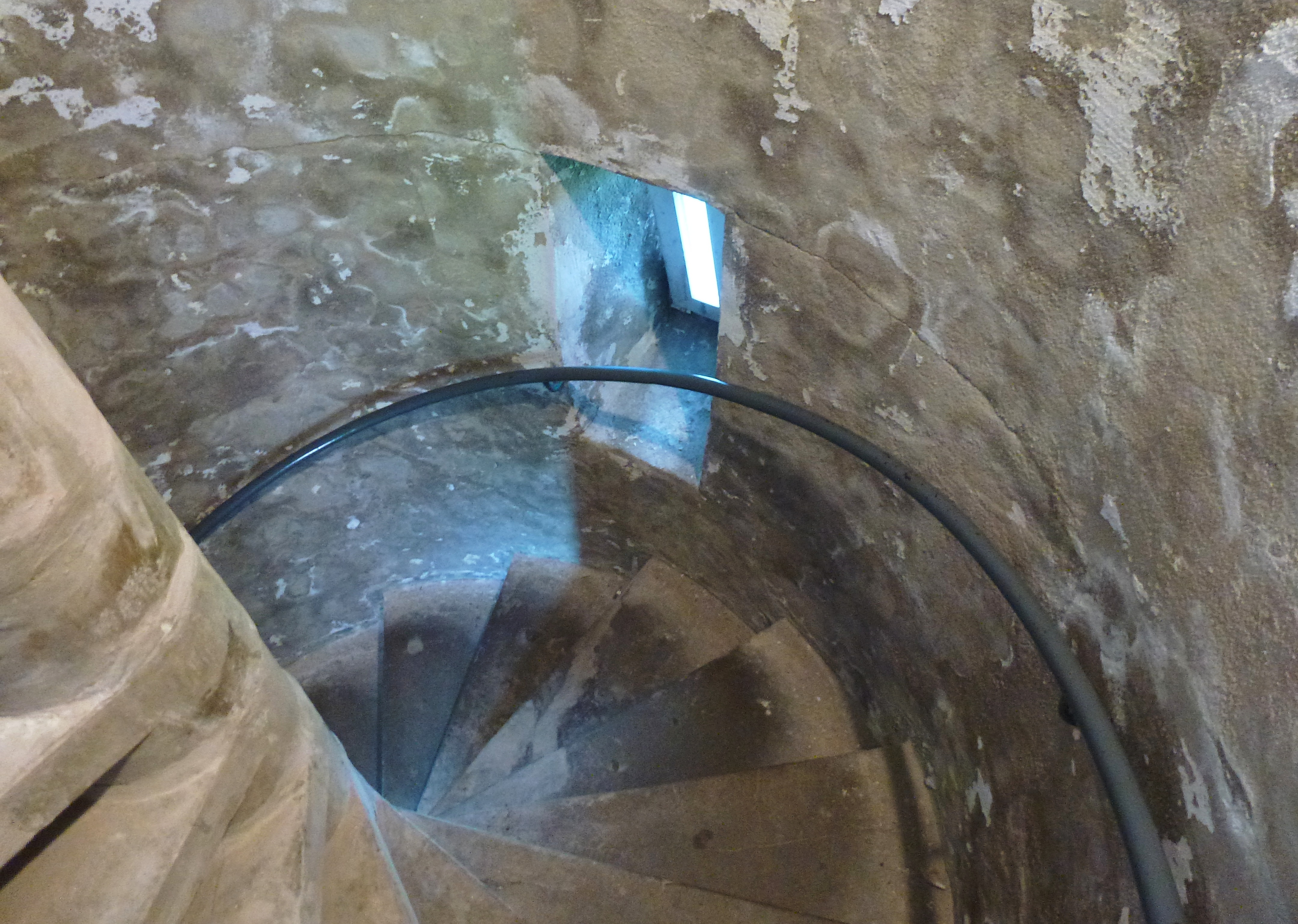 Lütjenburg, Bismarckturm, Treppe